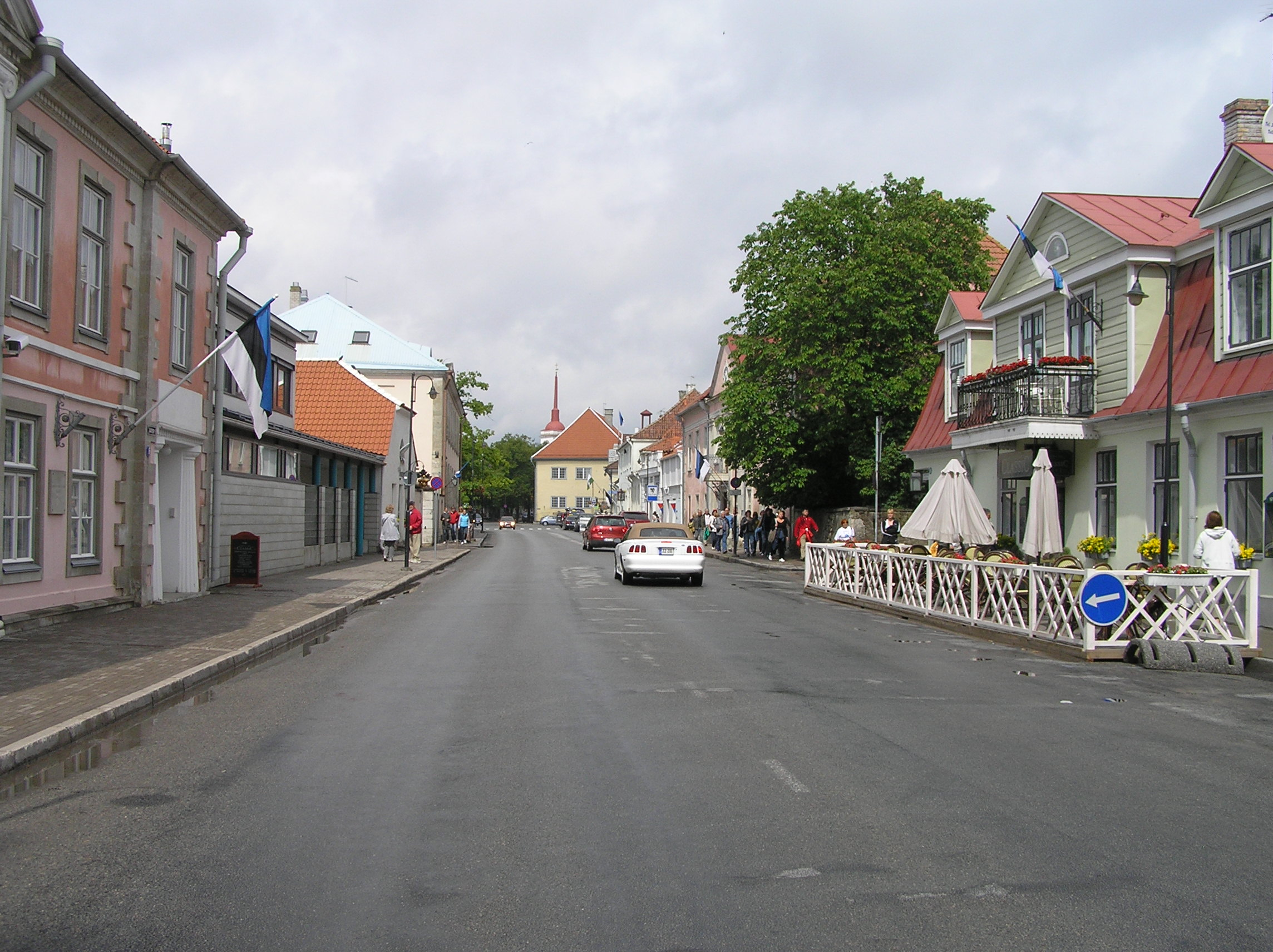 Ulice i budowle w Kuressaare, Estonia